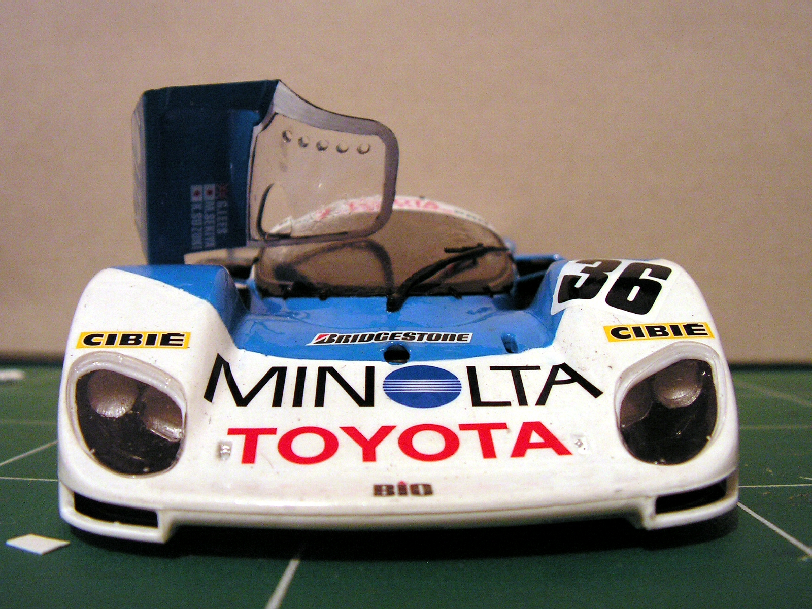 maquette tamiy toyota 88C